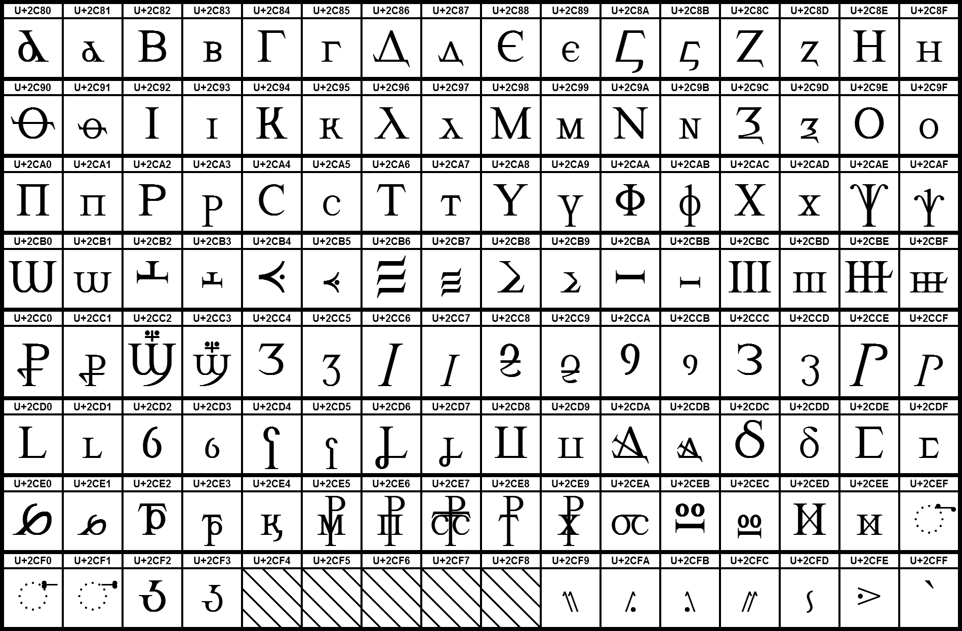 Grafiktafel für den Unicodeblock Koptisch. Schraffierte Felder sind unbesetzte Codepoints.